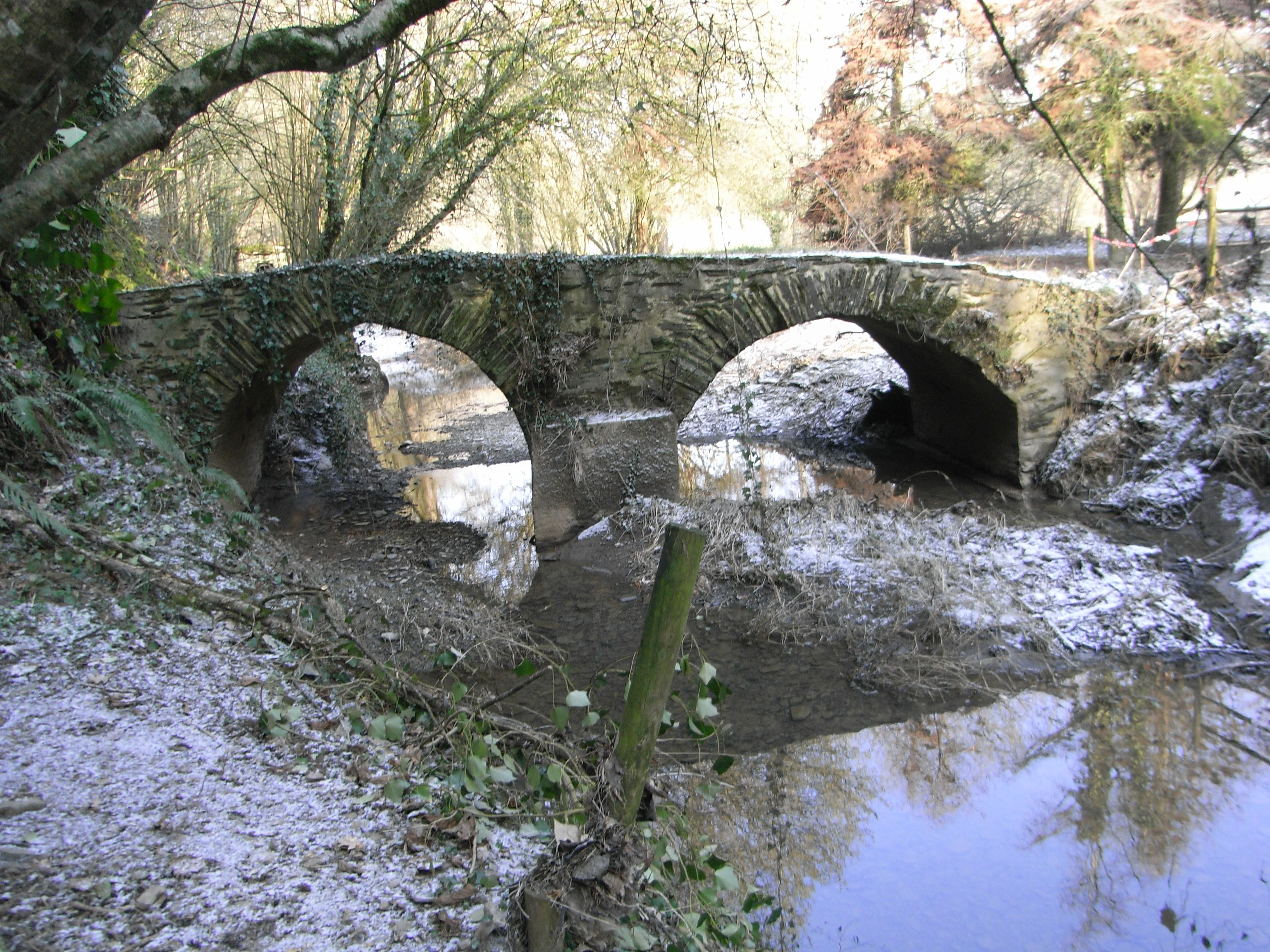 Pont romain (situé près de la Ducherie) sur la rivière Sanguèze limite départementale entre les communes de Gesté (Maine-et-Loire) et La Regrippière (loire-Atlantique).